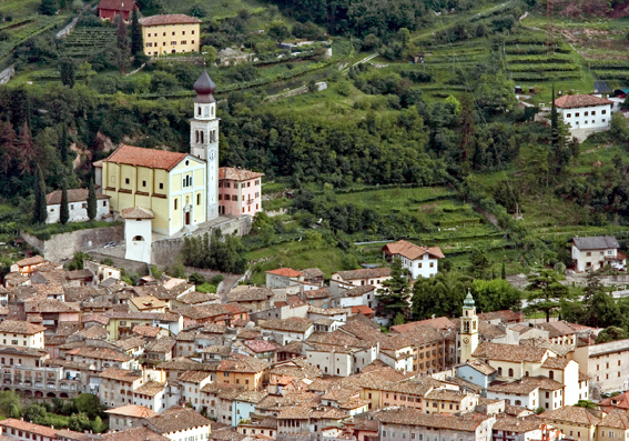 Panorama di Ala (provincia di Trento) dall'alto